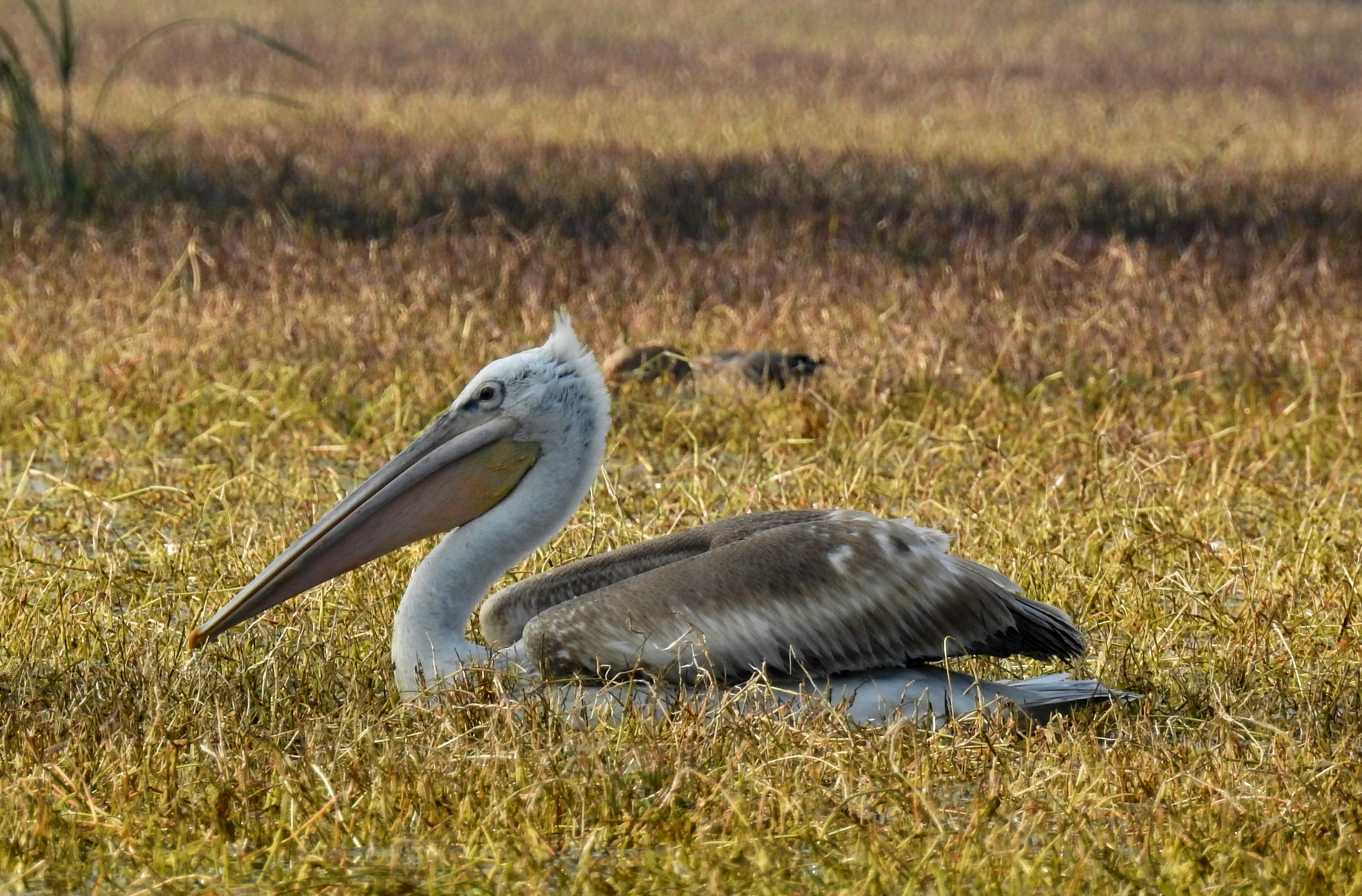 मराठी नाव: झोळीवाला